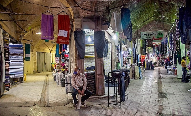 کسادی بازار سنتی کرمانشاه در ایام کرونا مرداد 1399